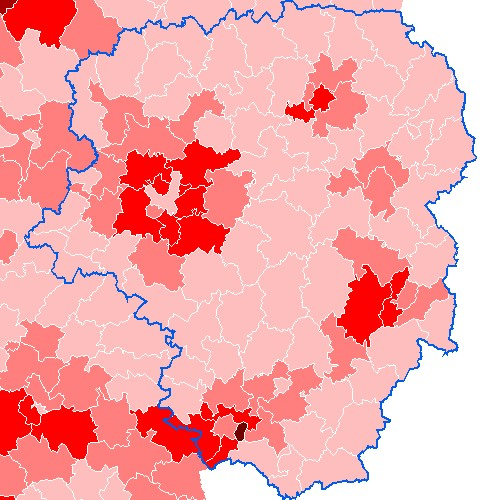 Carte de la proportion des moins de 20 ans dans la population de la région Limousin, par cantons, en 1999.